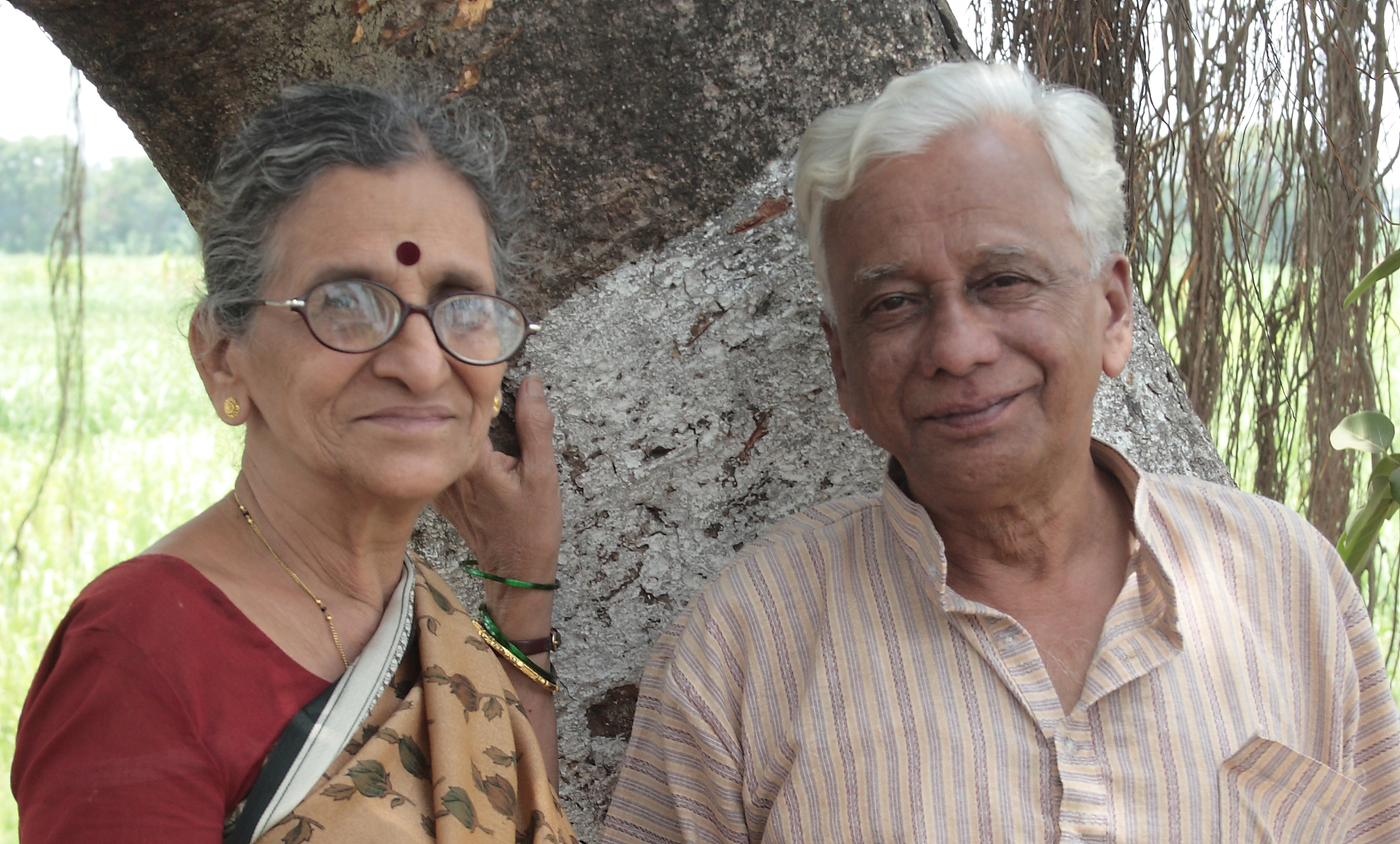 प्रा. विजय कारेकर, पत्नी सौ. विनता कारेकर यांच्याबरोबर २०१५